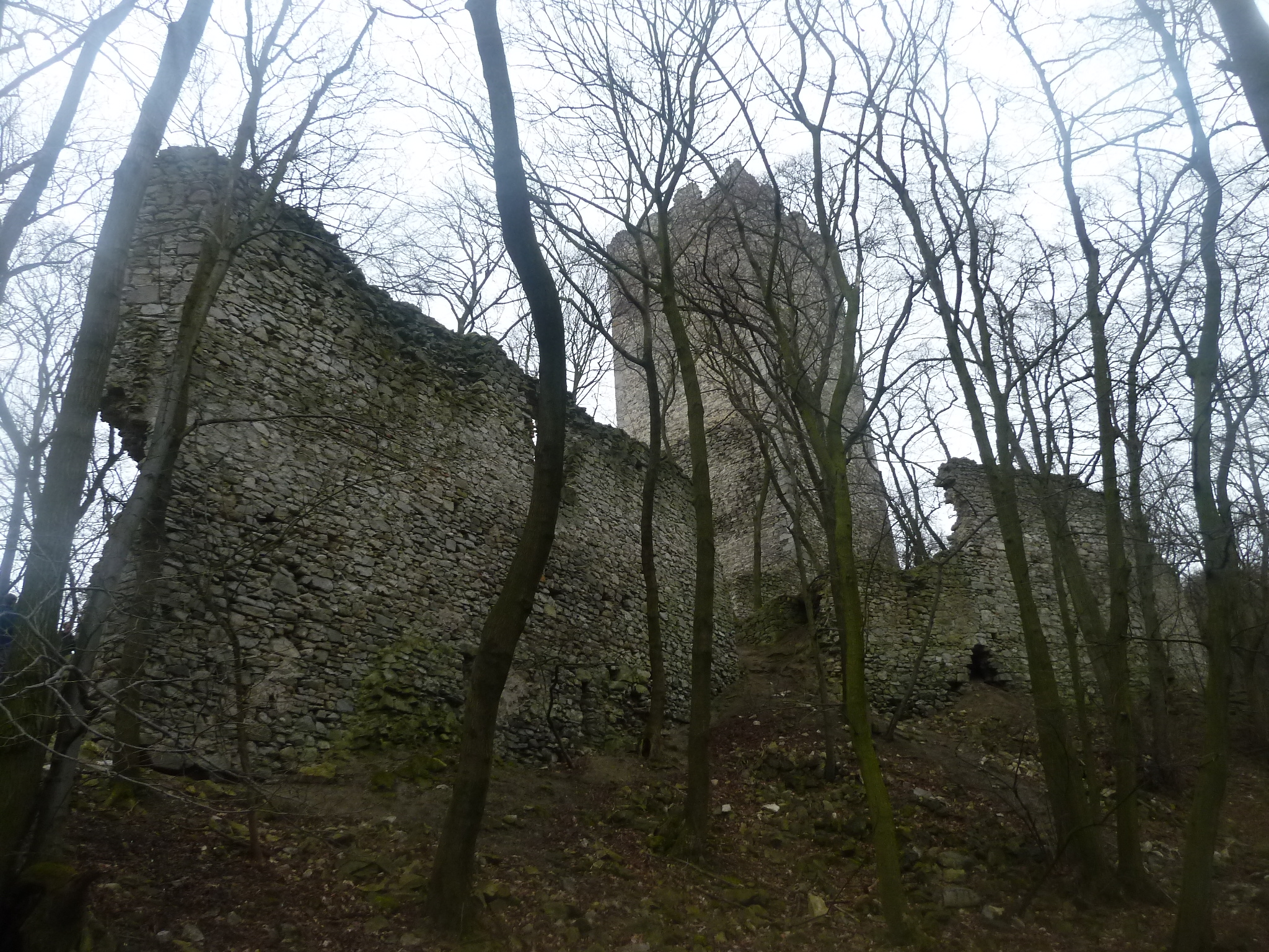 Zrúcanina hradu Pottenburg, Wolfsthal, Rakúsko